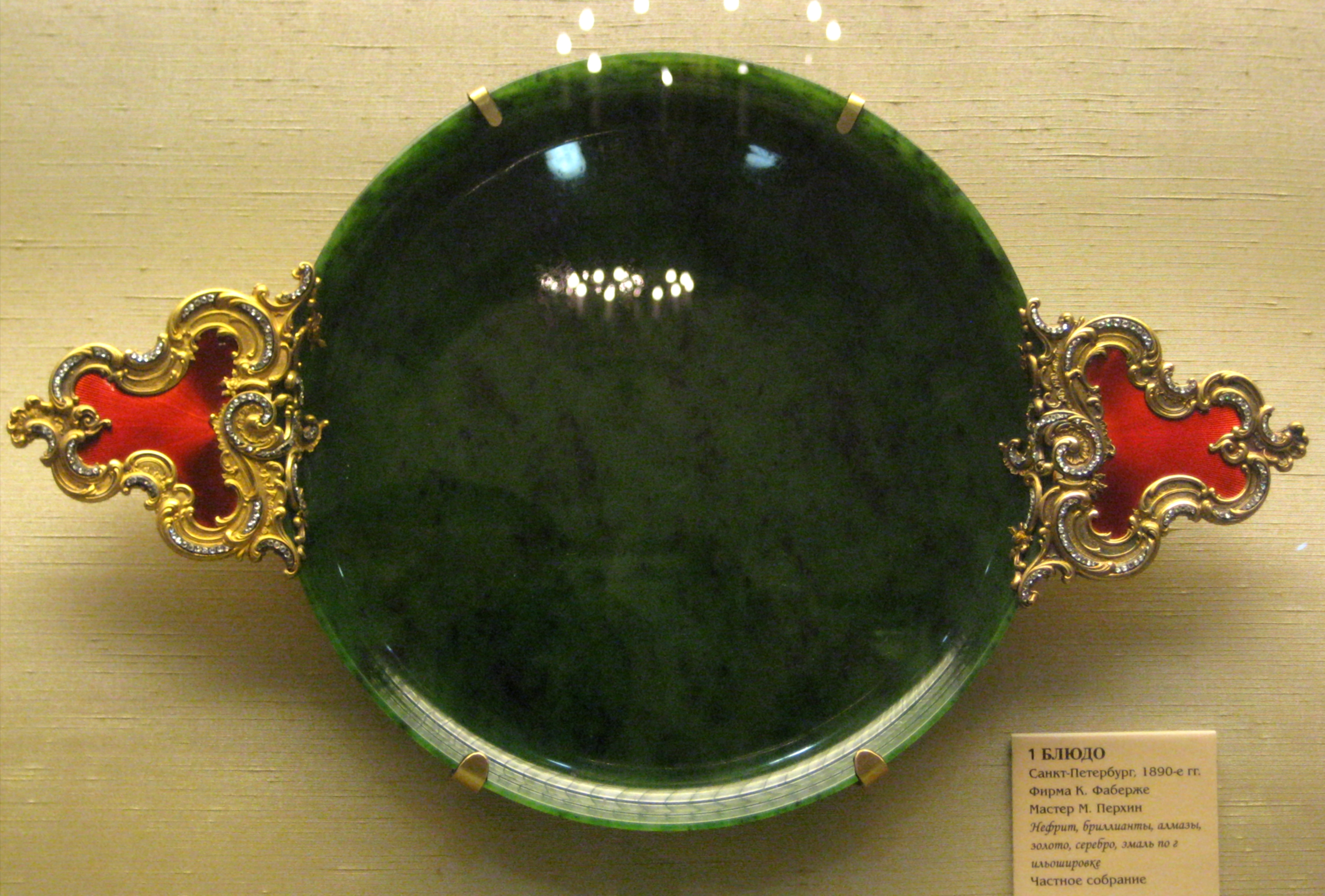 Блюдо. Фирма Фаберже, мастер М. Перхин. СПБ, 1890-е. Нефрит, бриллианты, эмаль. Частное собрание